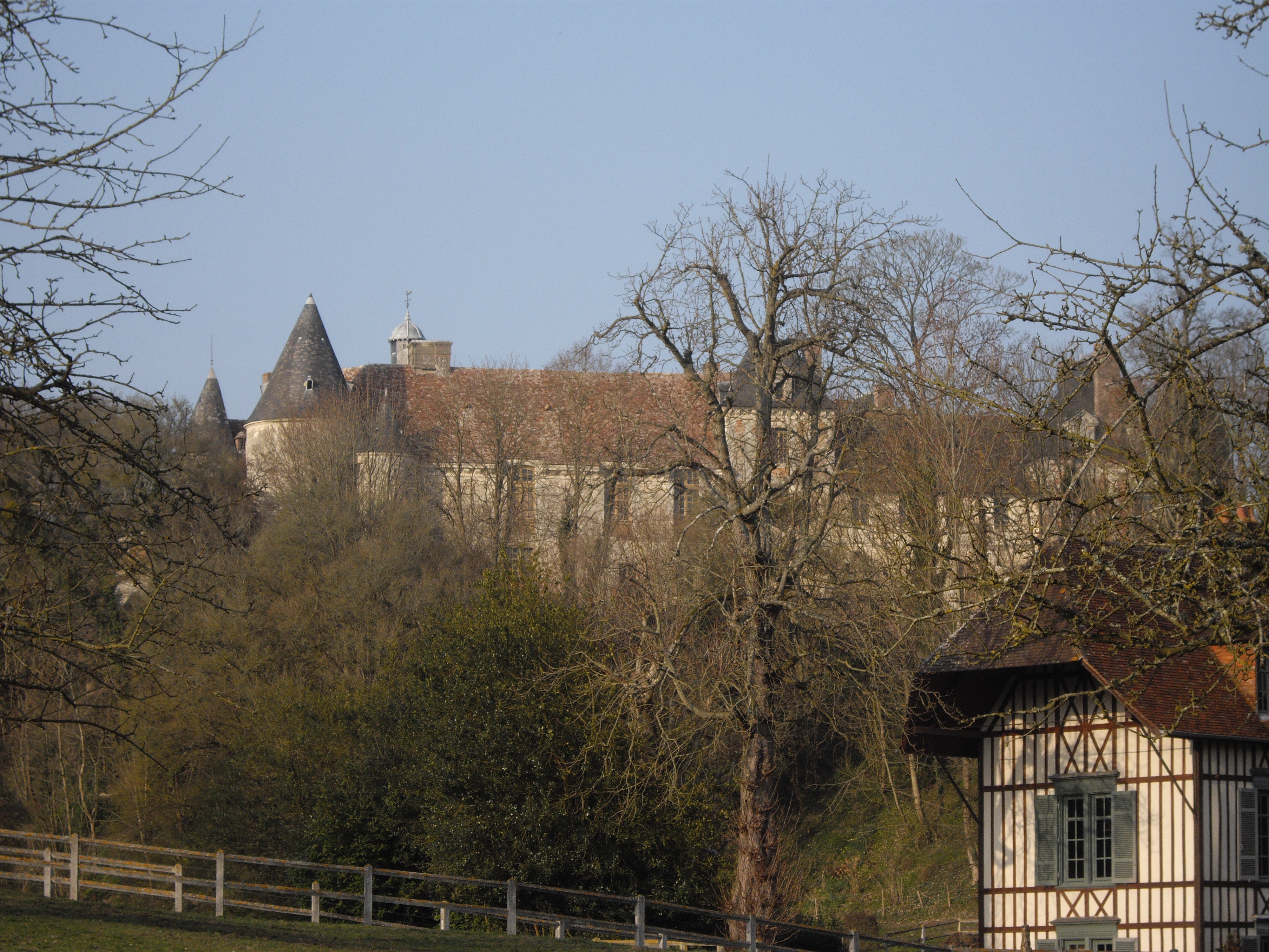 En arrière plan on distingue le château du Houley